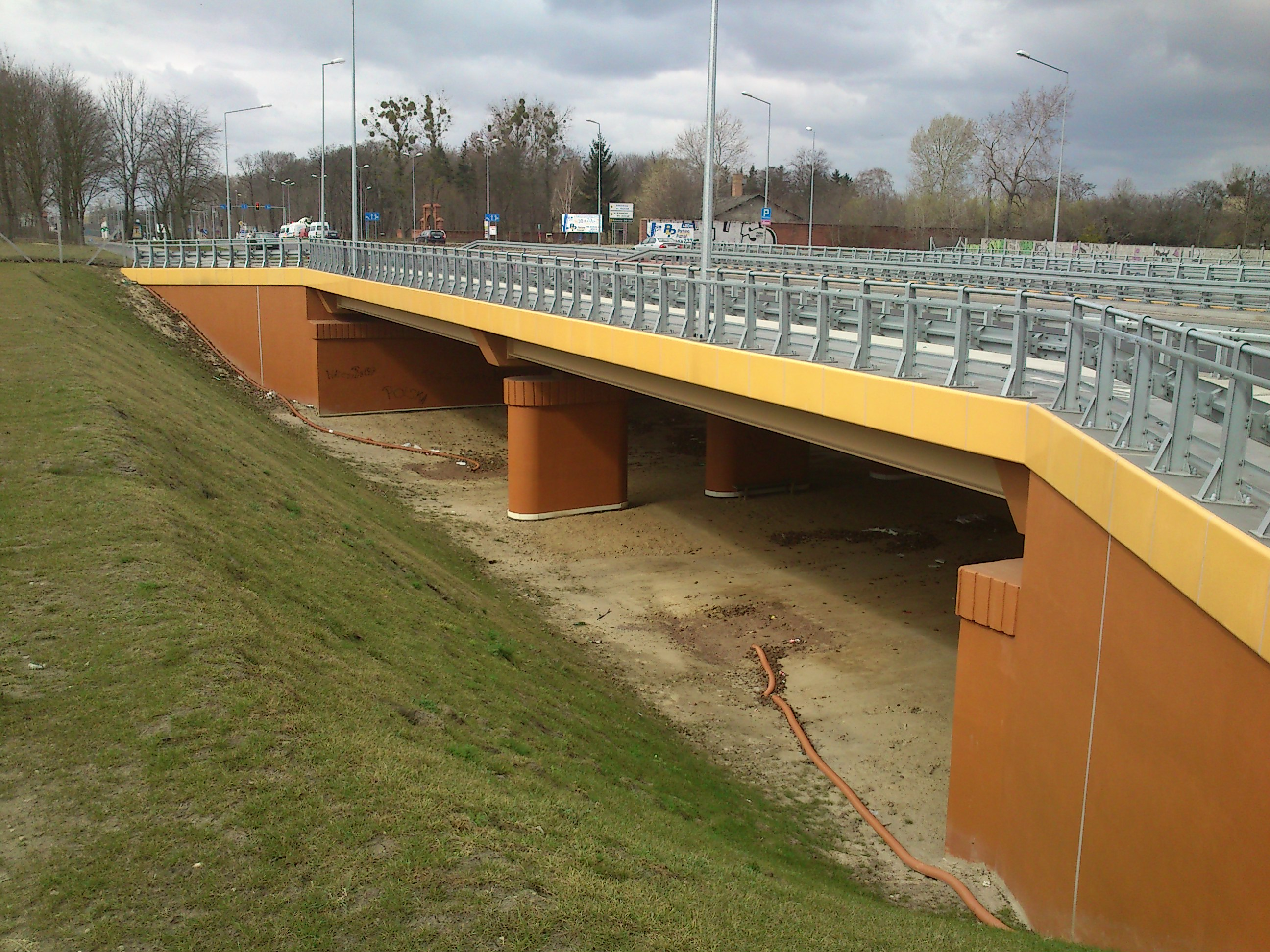 Wiadukt nad proj. III ramą komunikacyjną Poznania